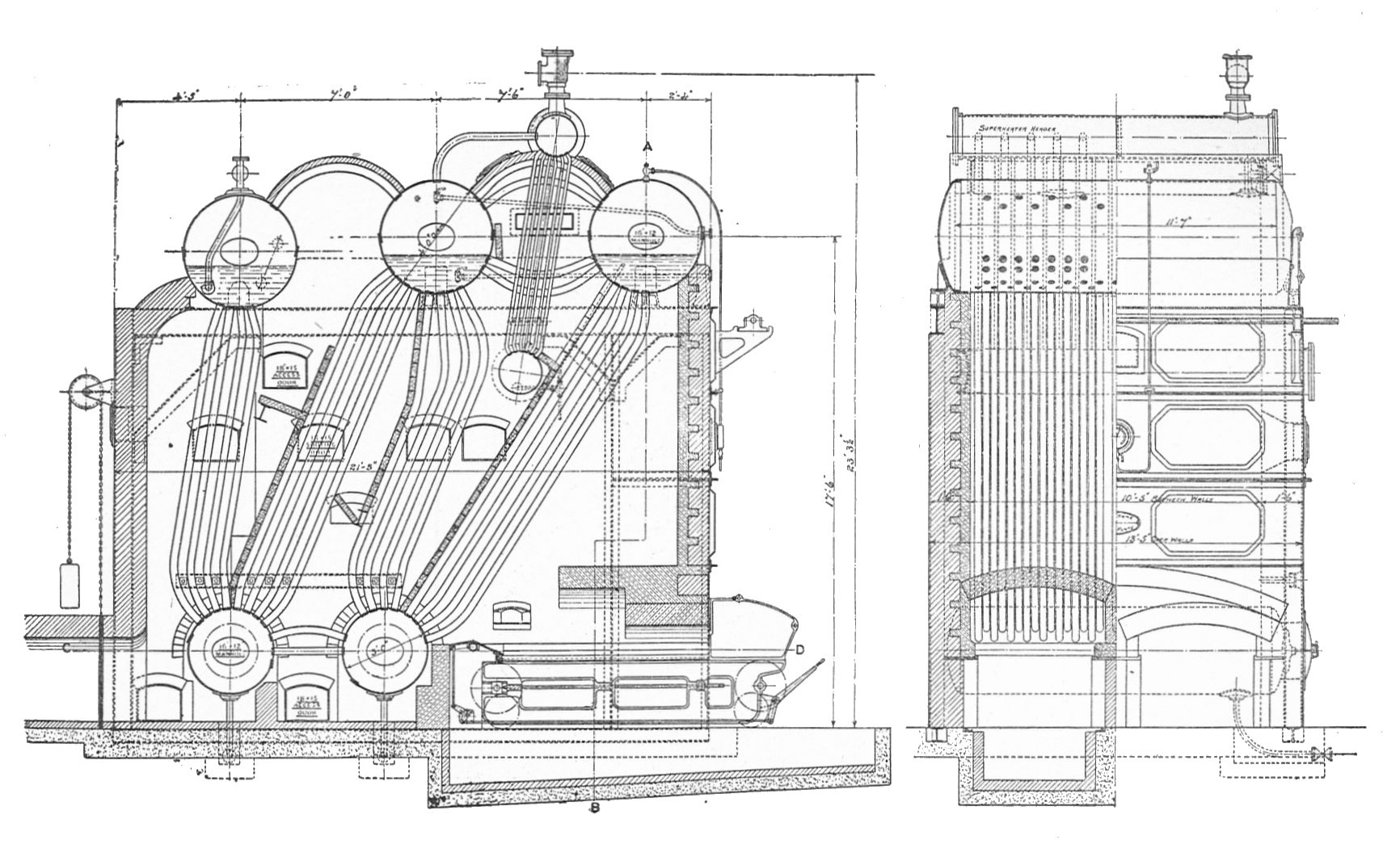 Stirling five-drum watertube boiler (Rankin Kennedy, Modern Engines, Vol VI).jpgFig. 71